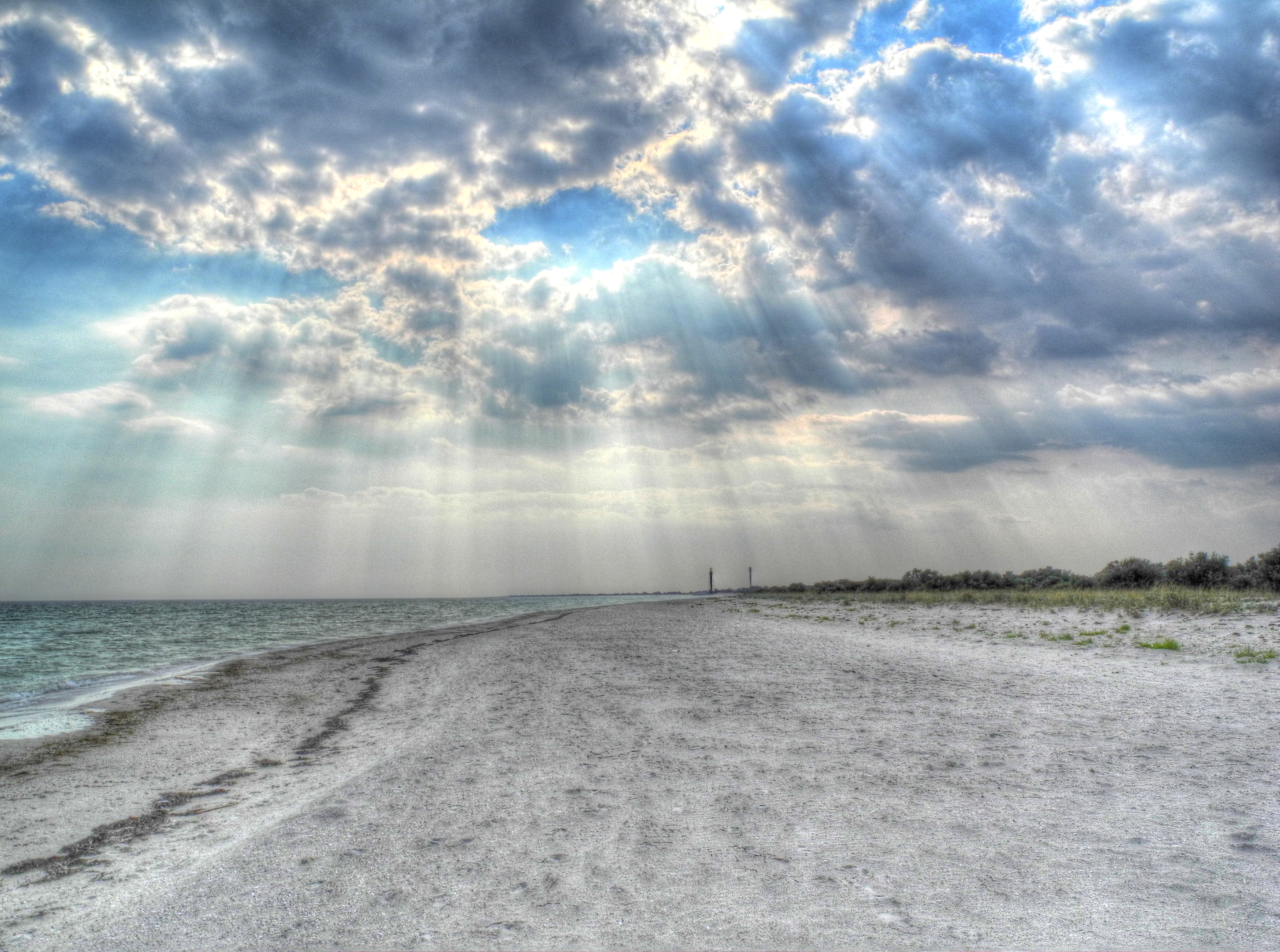 о.Джарылгач в хорошую погоду